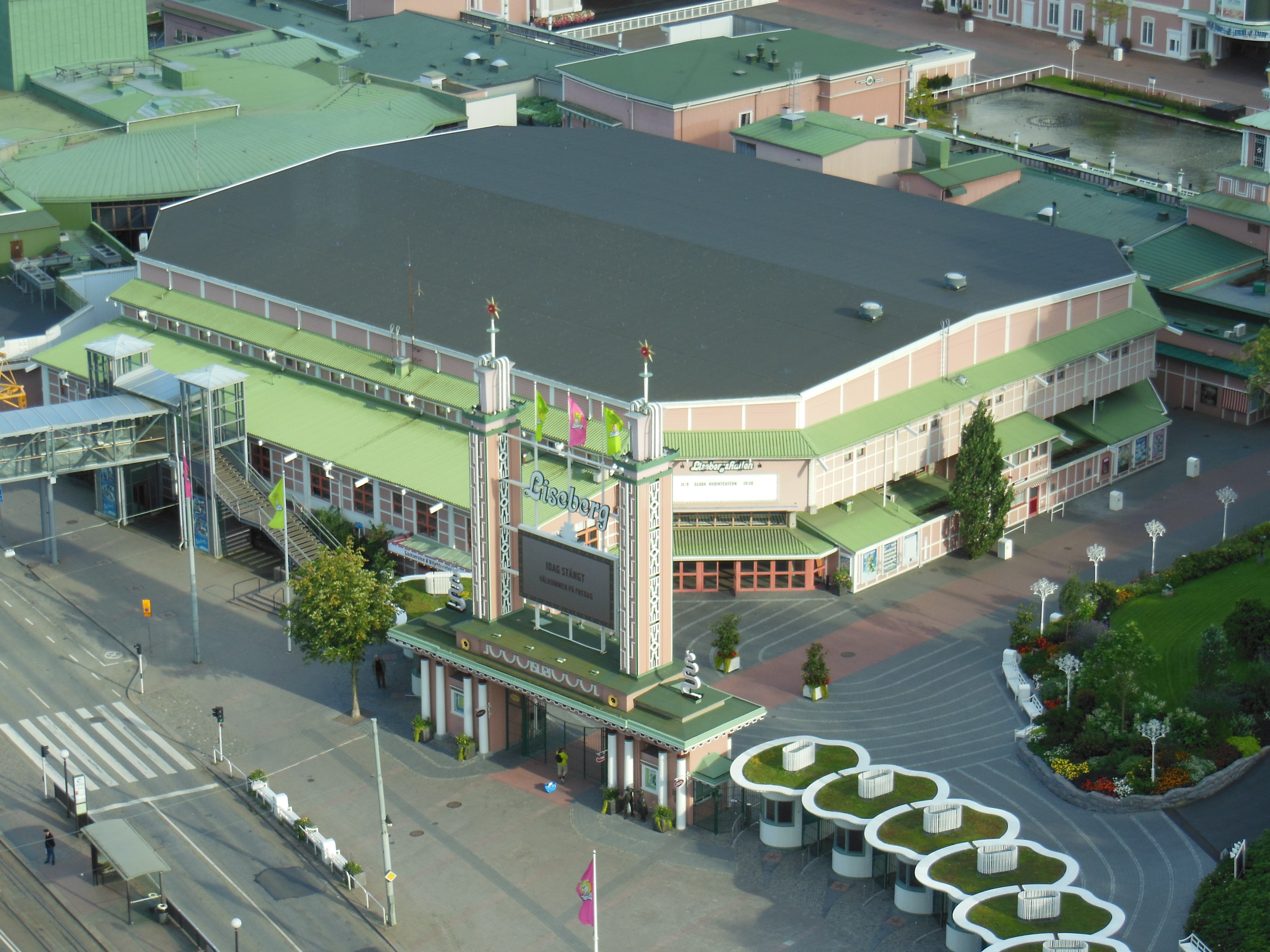 Lisebergshallen sedd från Gothia Towers västra torn.